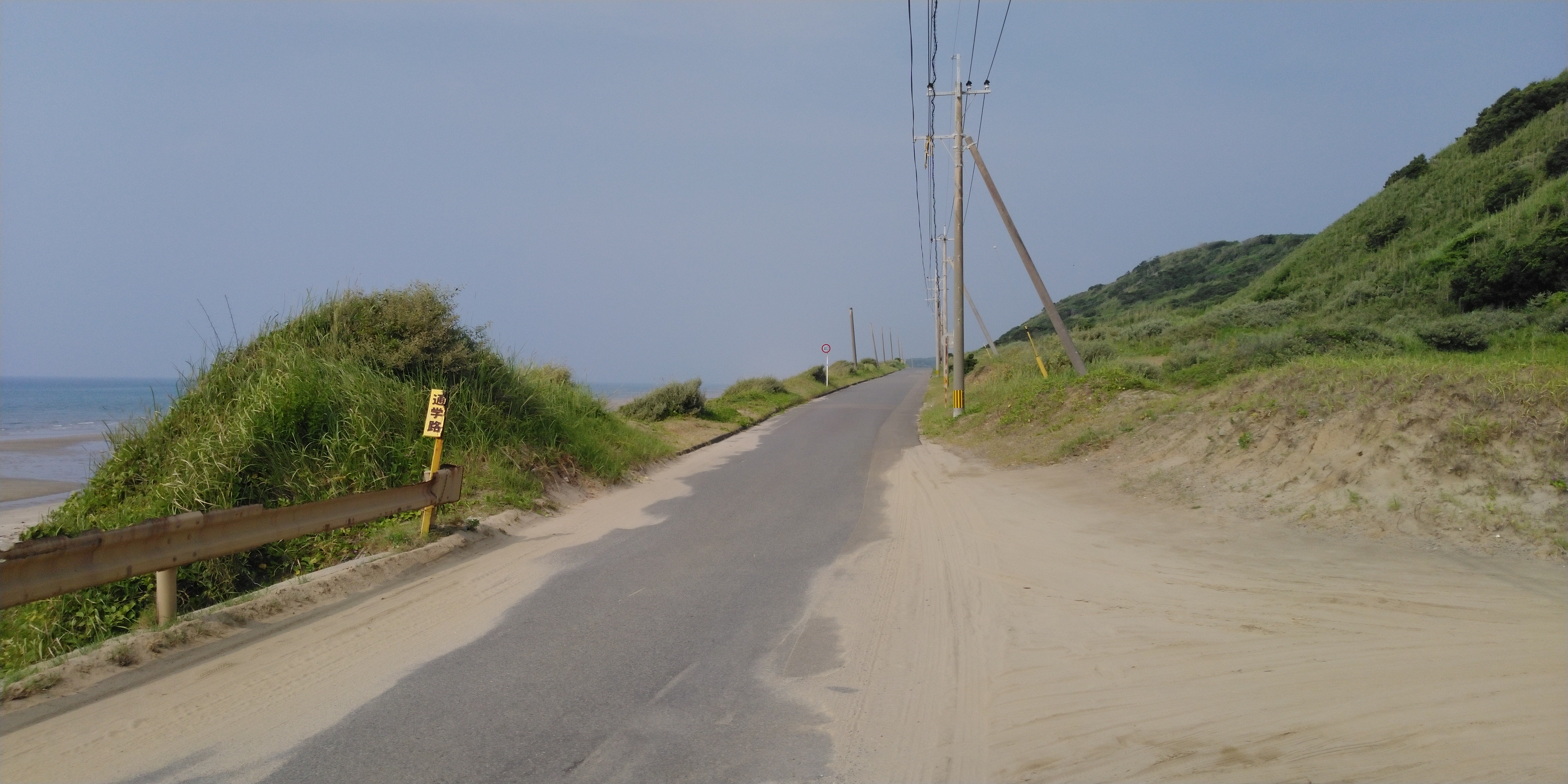 鹿児島県道588号野間島間港線（中種子町屋久津付近）